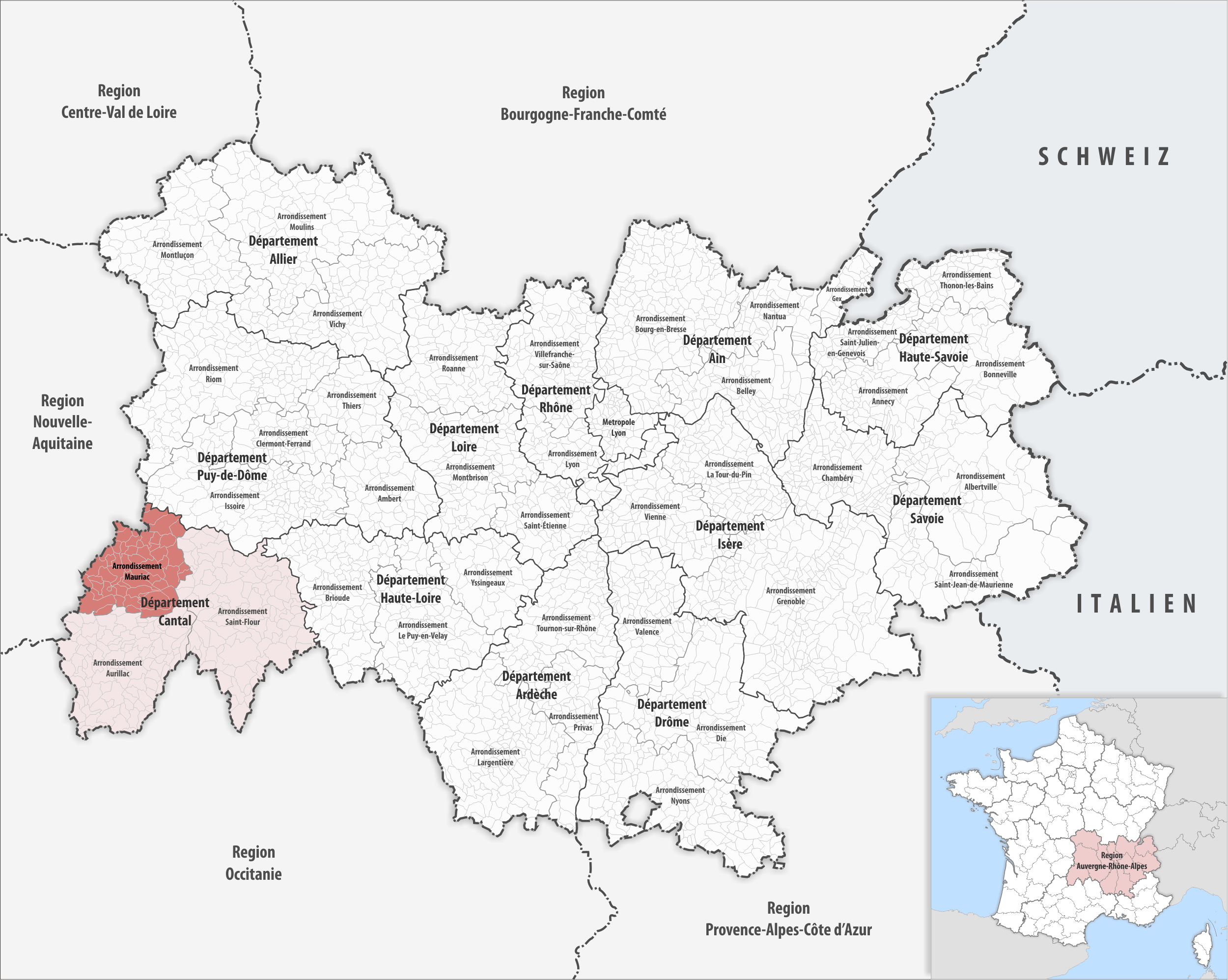 Lage des Arrondissements Mauriac